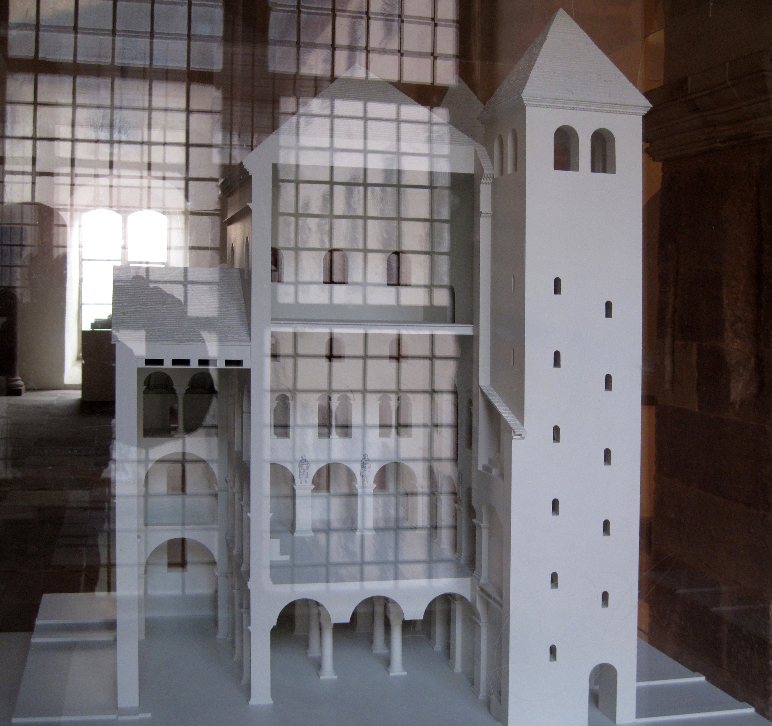 Kirche St. Stephanus und Vitus, Kaiser-Kirche, Modell des Westwerks, Corvey, Höxter, Nordrhein - Westfalen, Deutschland